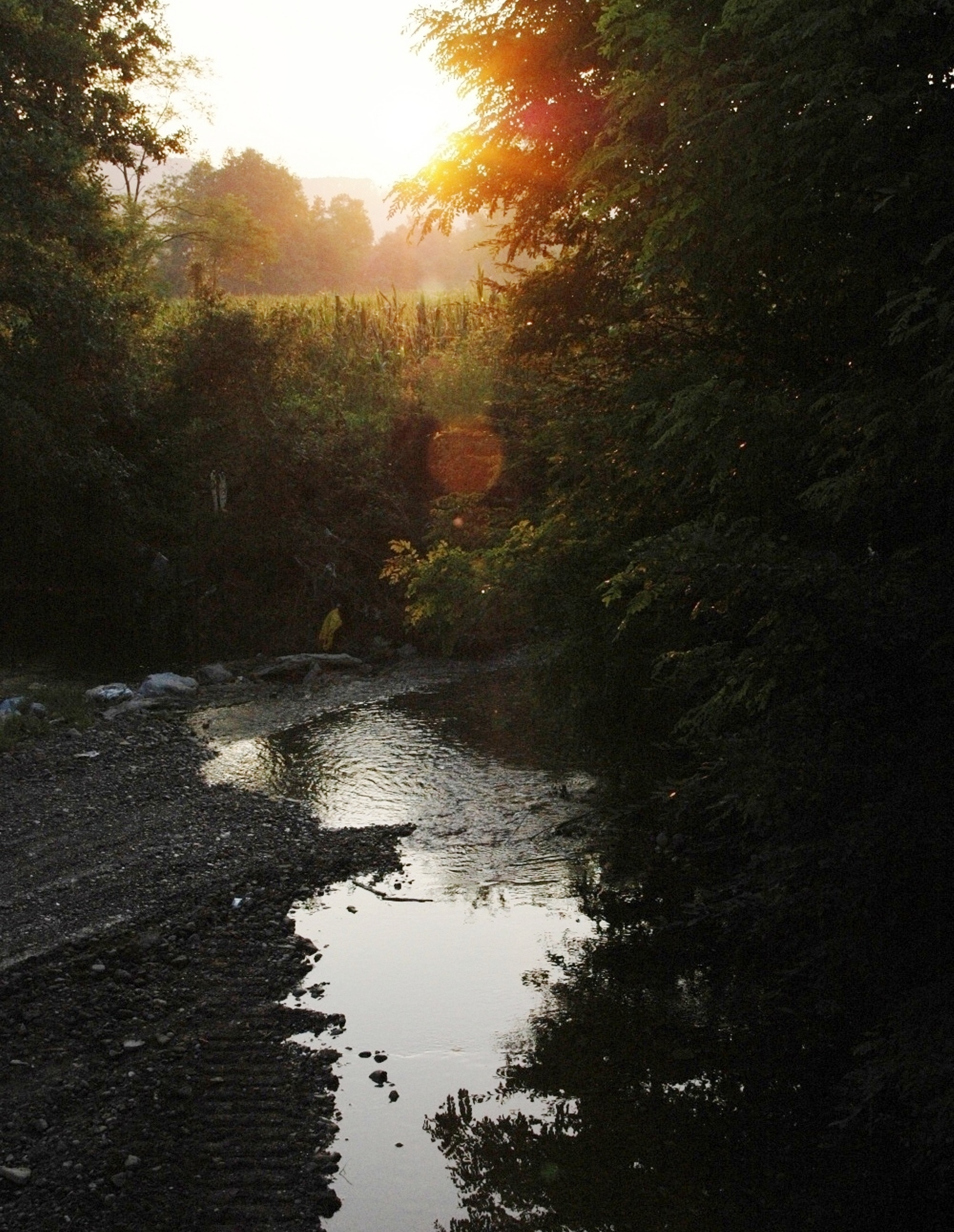 Драгобиљица, јул 2005